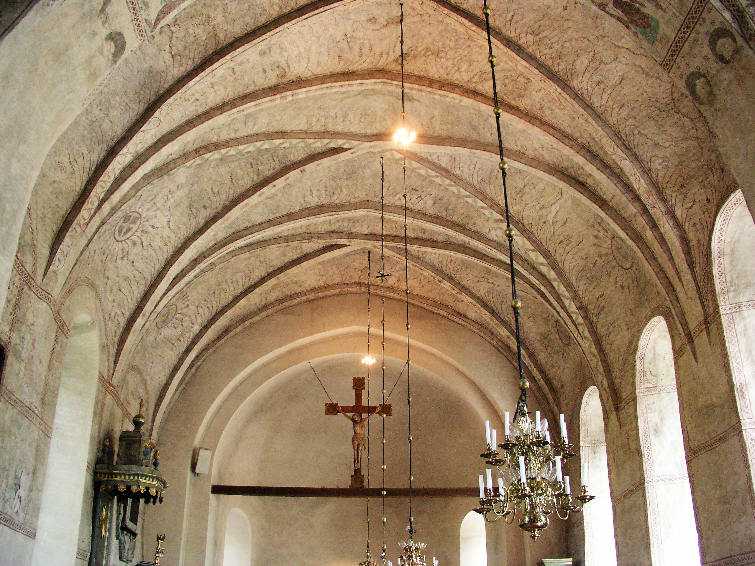 Gamla Uppsala kyrka, Diocese of Uppsala, Gamla Uppsala, Sweden. Celing in nave.